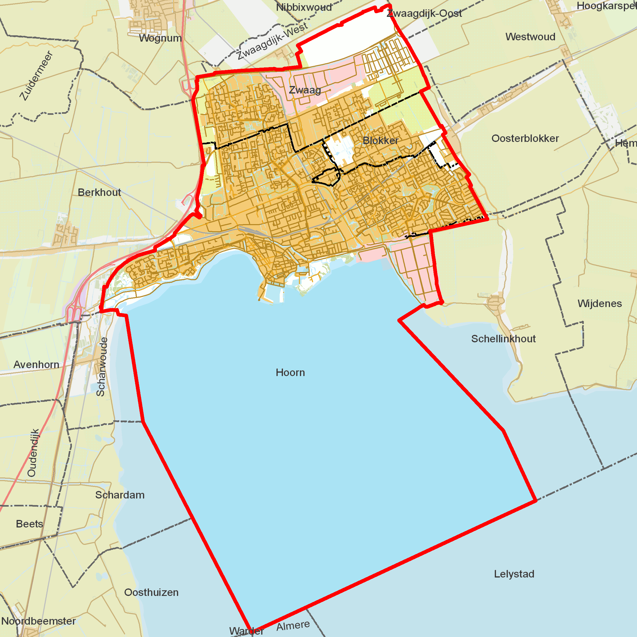 BAG woonplaatsen - Gemeente Hoorn.png